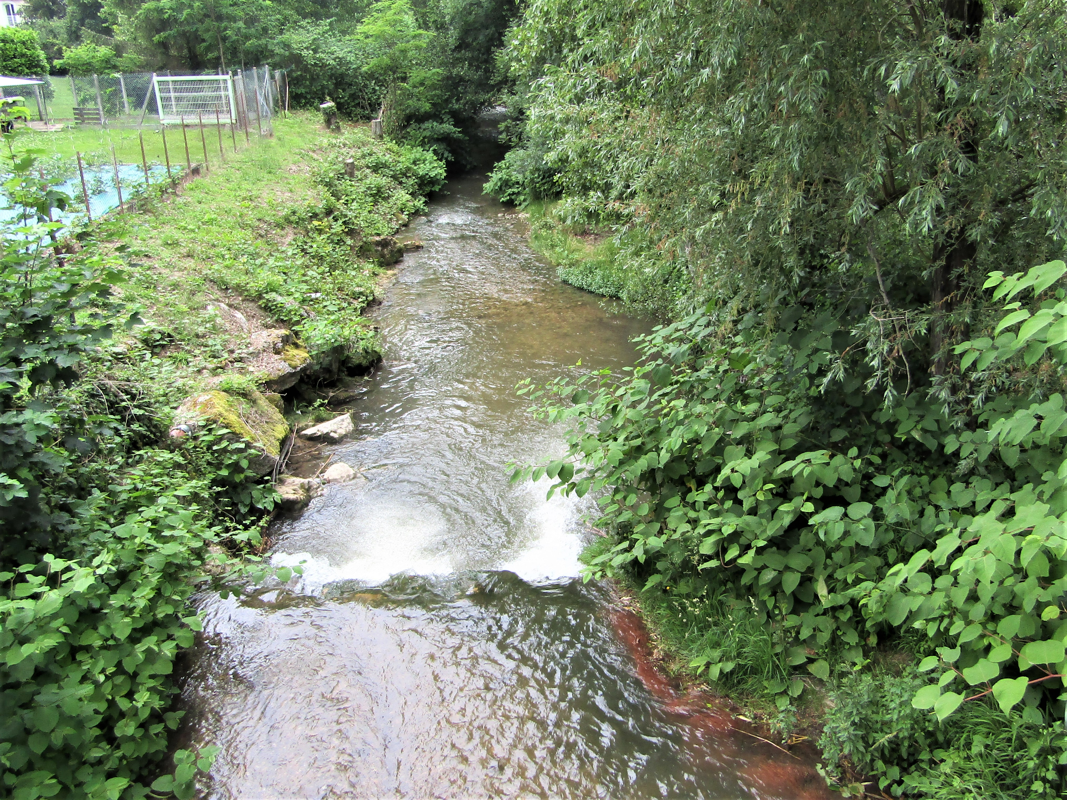 L'Agny à Nivolas Vermelle en juin 2019